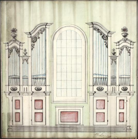 Karl Mauracher-Orgel von Saalfelden